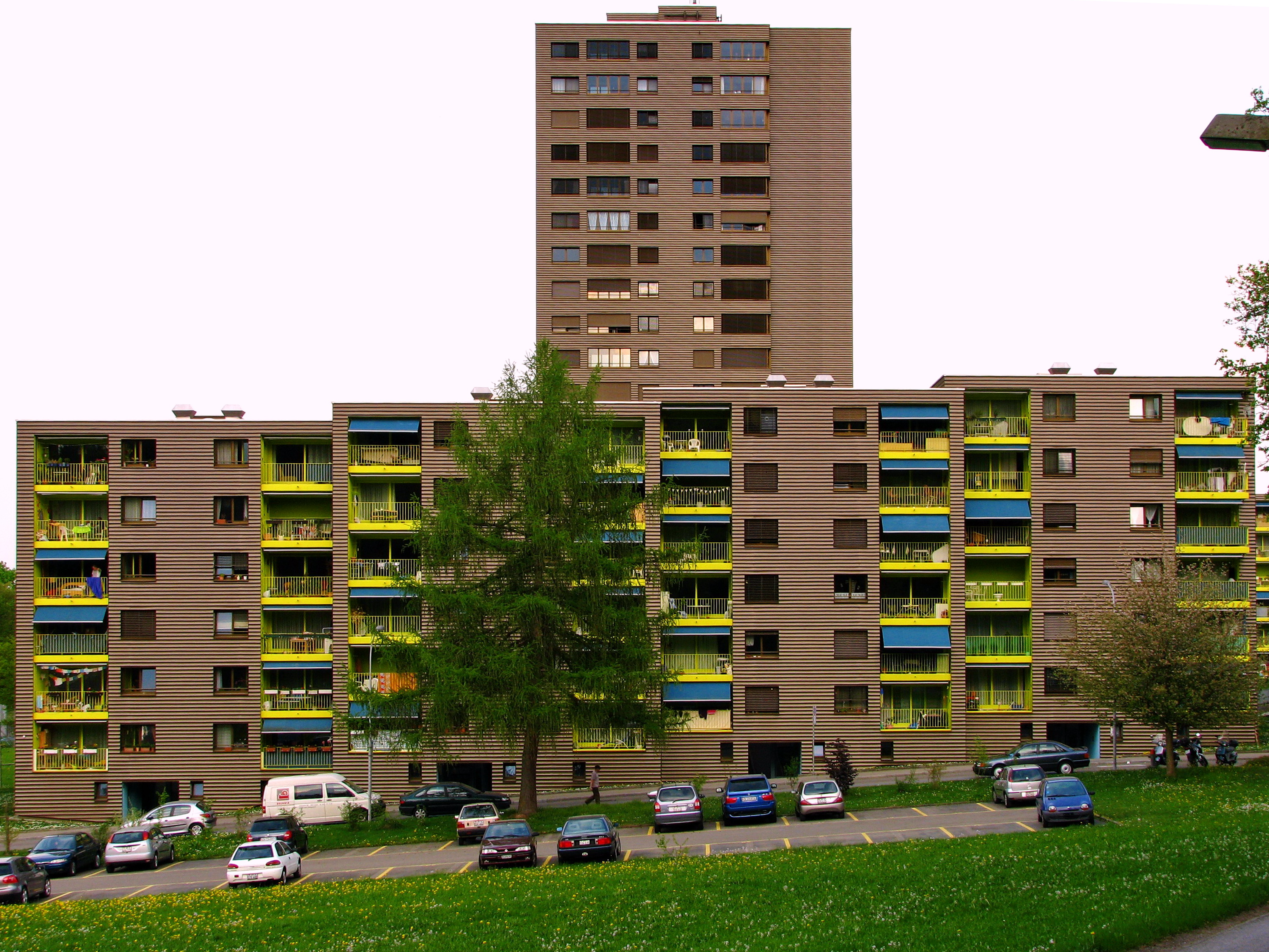 Appartment buildings at Schwandenholz in Zürich-Seebach